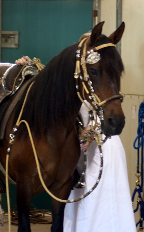 Peruvian Paso